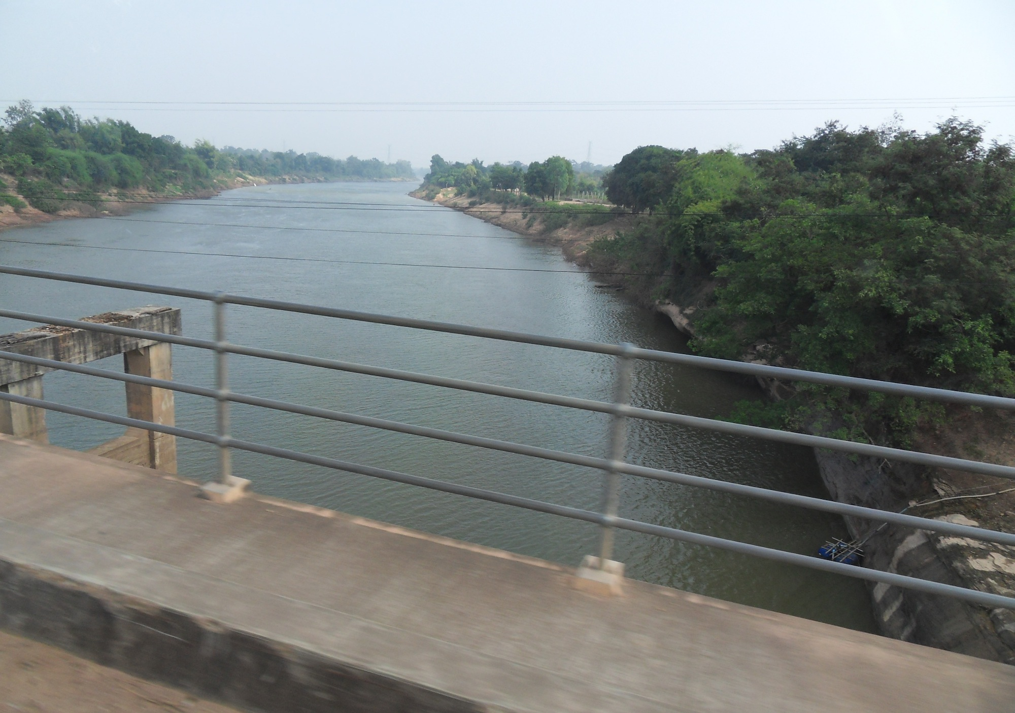 Pont de la route laotienne n°13 sur la Sebangfay, qui forme à cette endroit la limite entre la province de Savannakhet (à droite) et la province de Khammouane (à gauche). Vue vers l'amont. Le confluent avec le Mékong se trouve (loin) derrière le photographe.